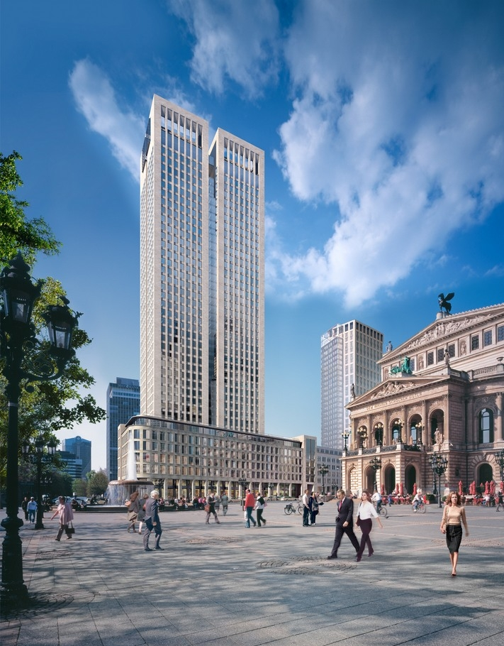 Heroshot des zukünftigen OpernTurm